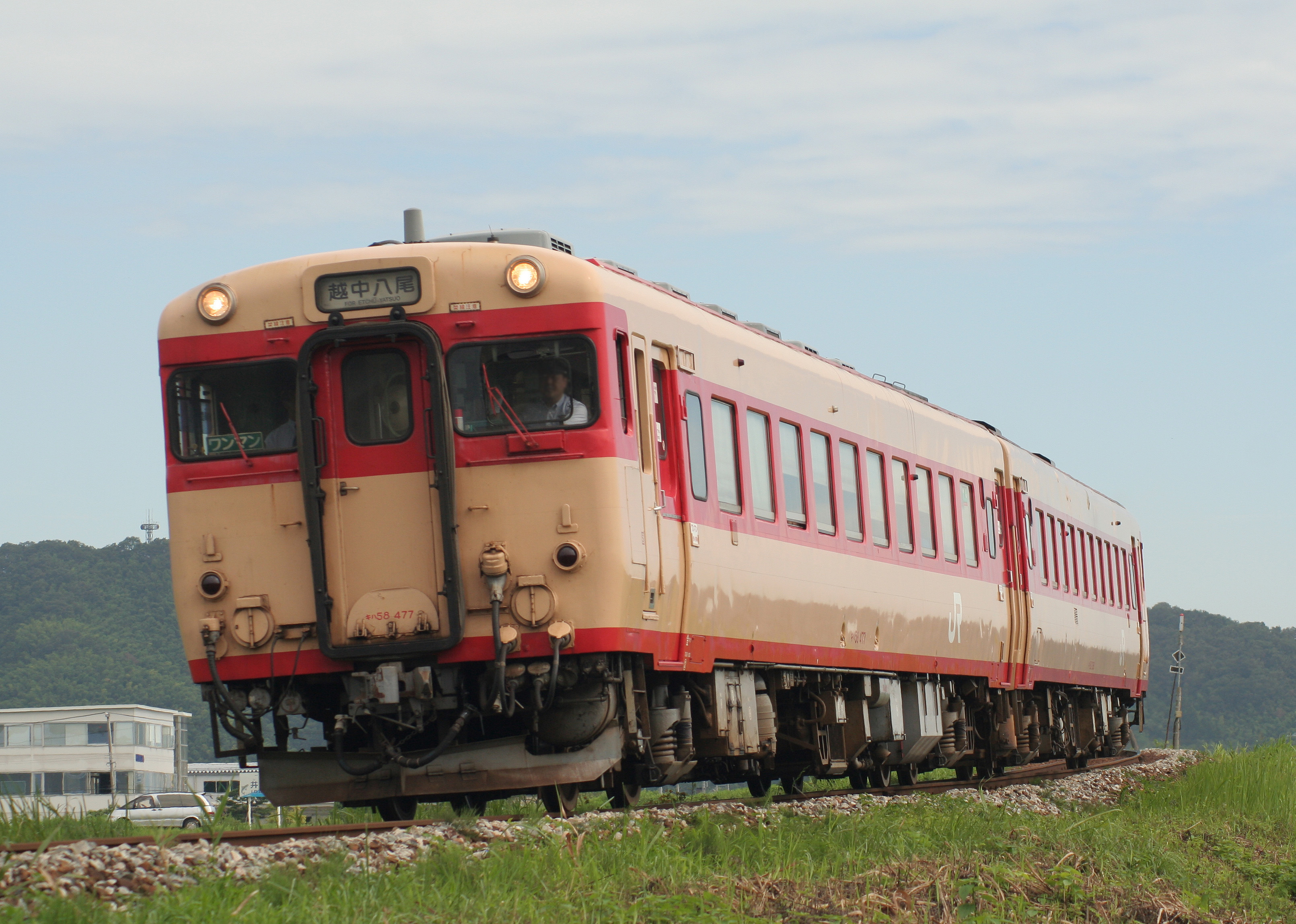 JR西日本キハ58系気動車 キハ58-477+キハ28-2360 高山本線、西富山 - 婦中鵜坂 852D